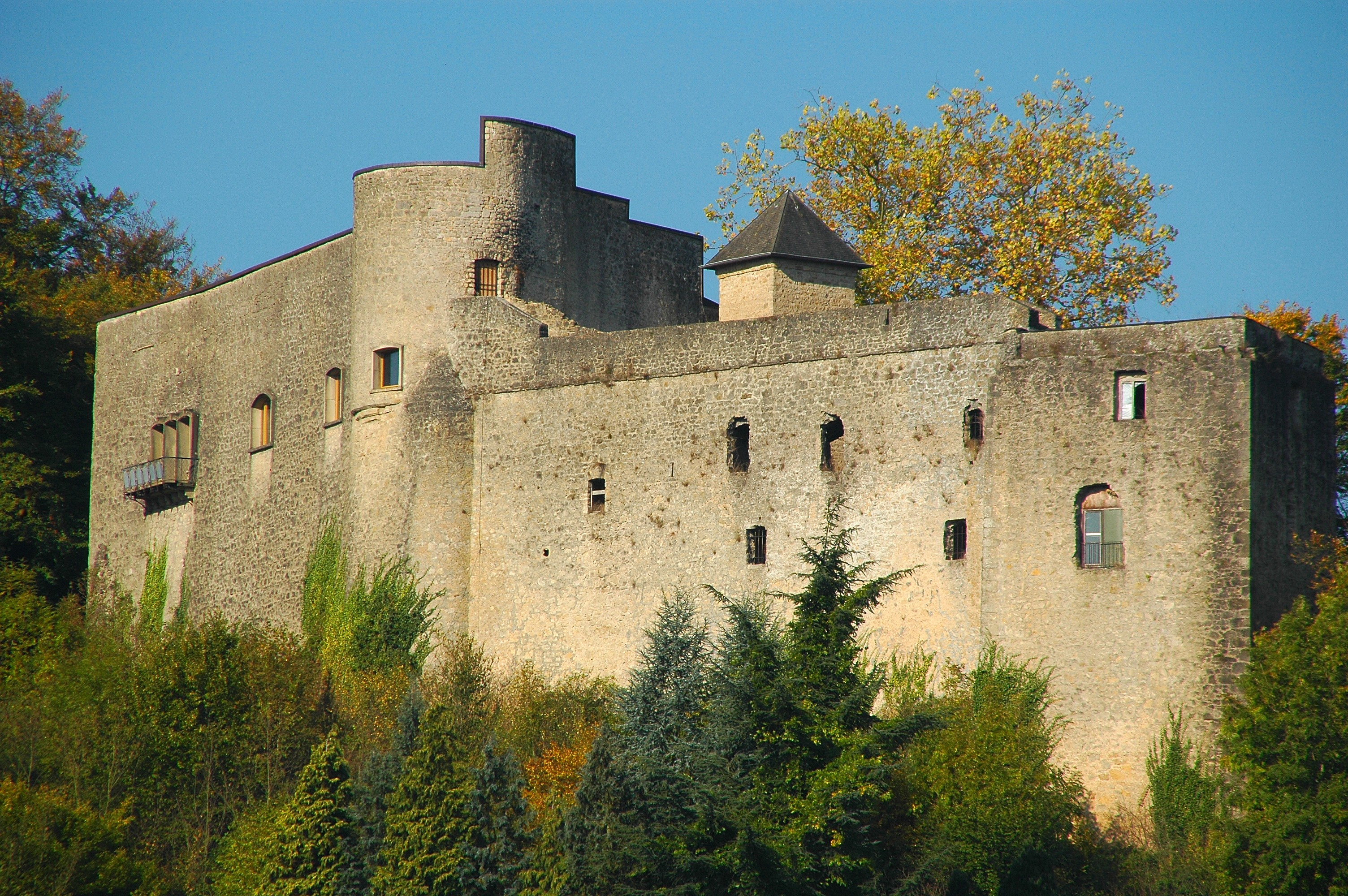 Südseite der Burg von Septfontaines